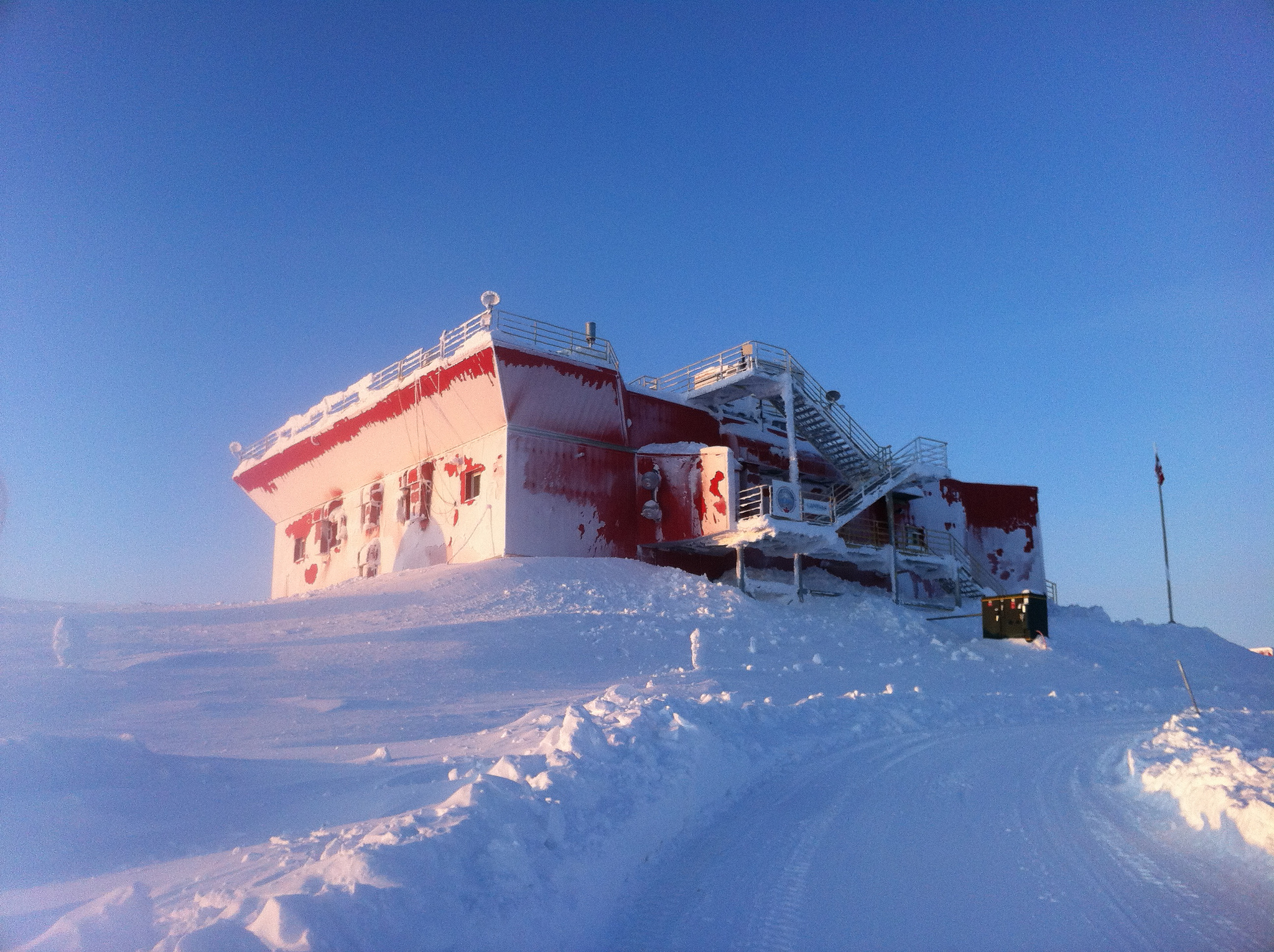 PEARL